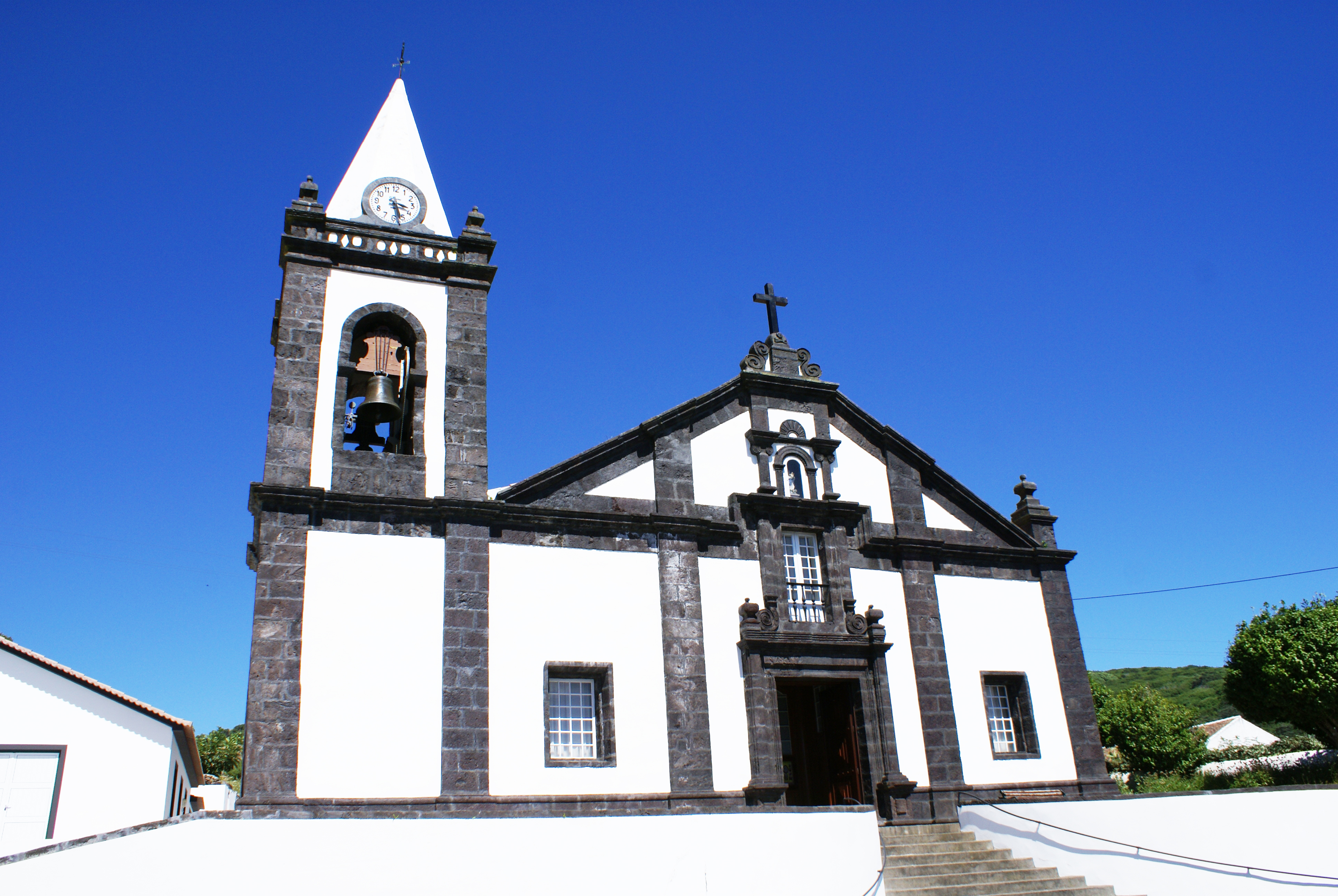 Igreja de Nossa Senhora da Luz, fachada, Santa Cruz da Graciosa, ilha Graciosa, Açores, Portugal